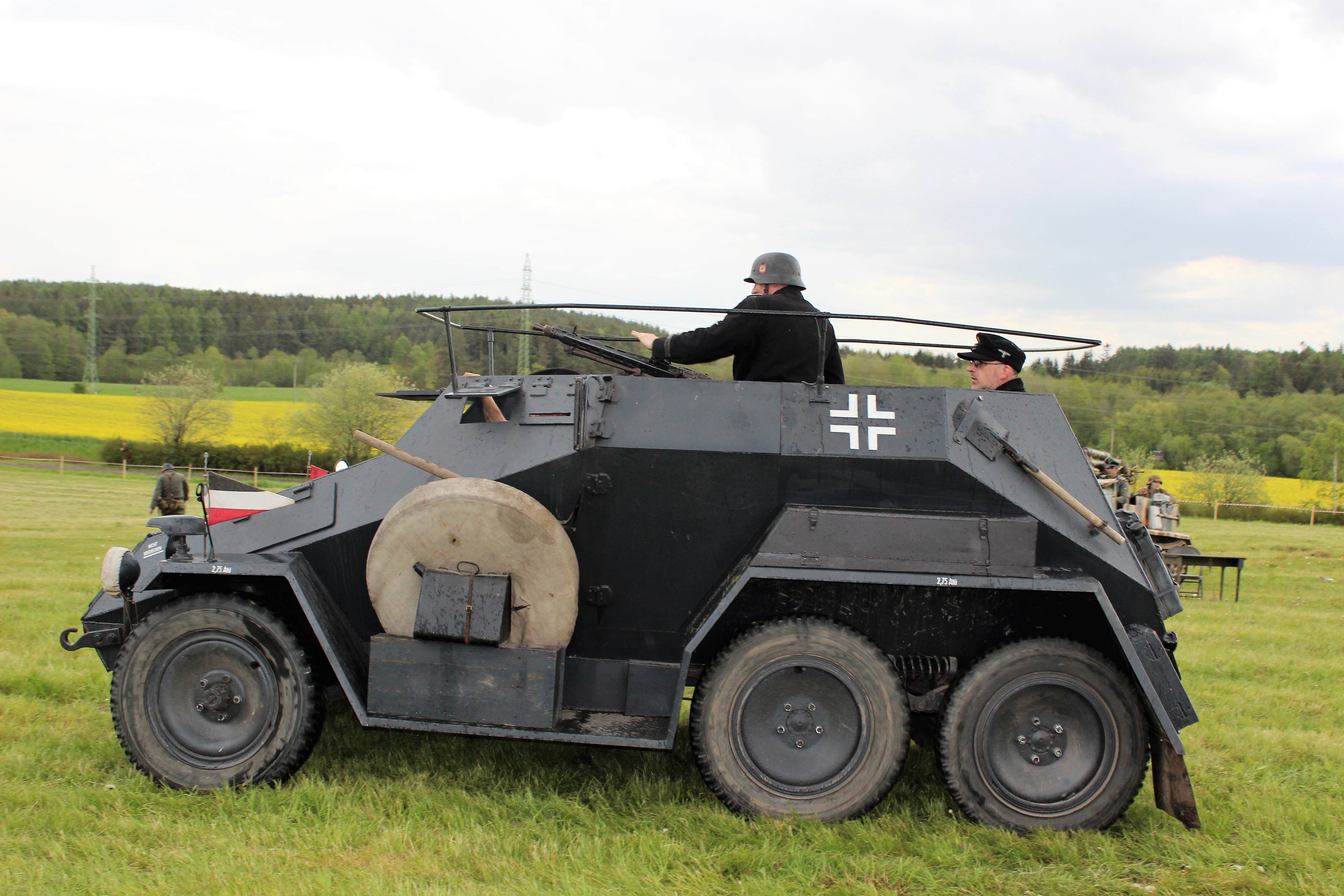 Slivice 1945 / 2017. Připomínka poslední bitvy 2. světové války v Evropě. Památník Vítězství (Slivice). Okres Příbram. Česká republika. Personality rights warningAlthough this work is freely licensed or in the public domain, the person(s) shown may have rights that legally restrict certain re-uses unless those depicted consent to such uses. In these cases, a model release or other evidence of consent could protect you from infringement claims.